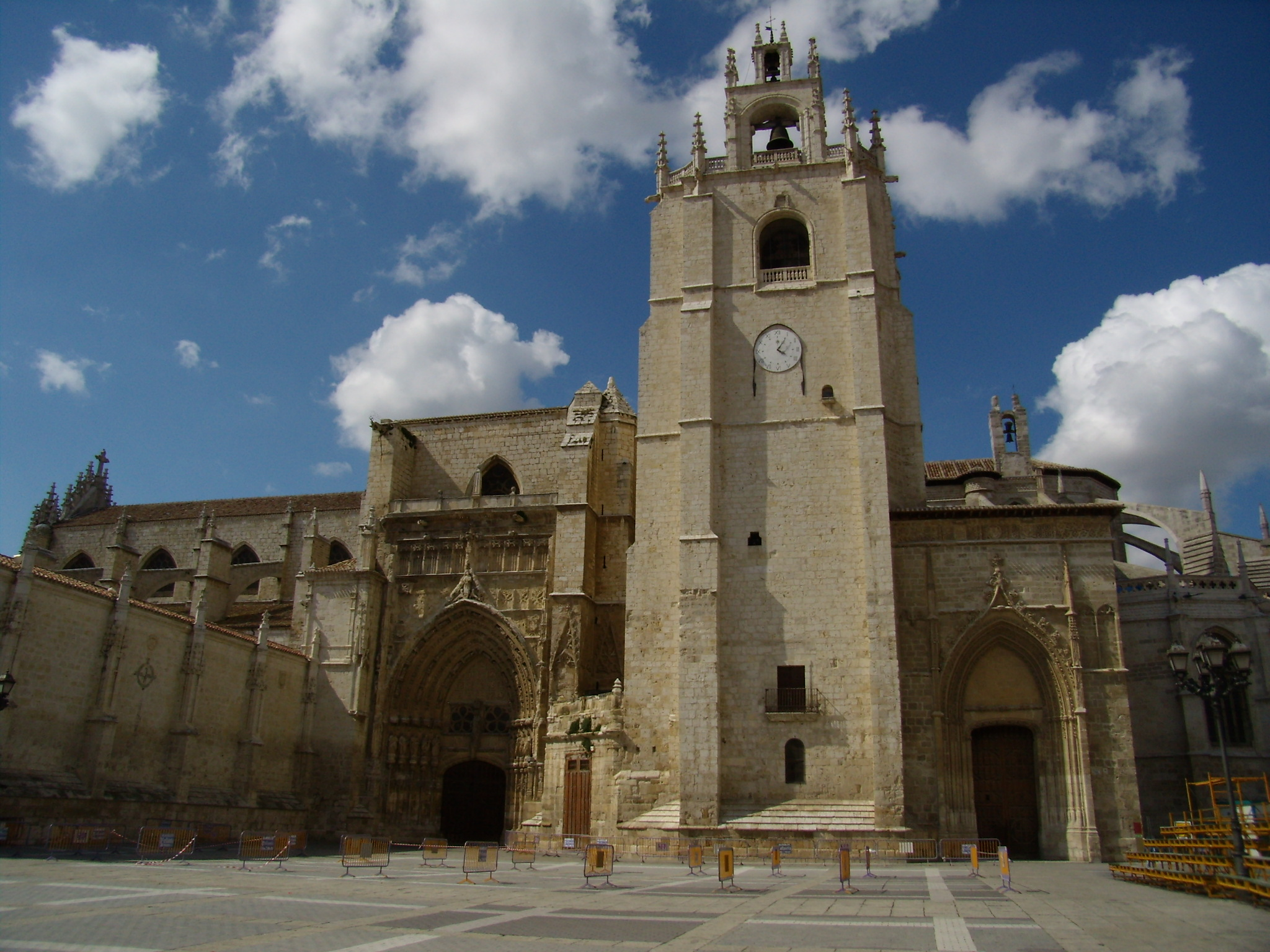 Exterior de la Catedral de Palencia vista desde la Plaza de la Inmaculada.